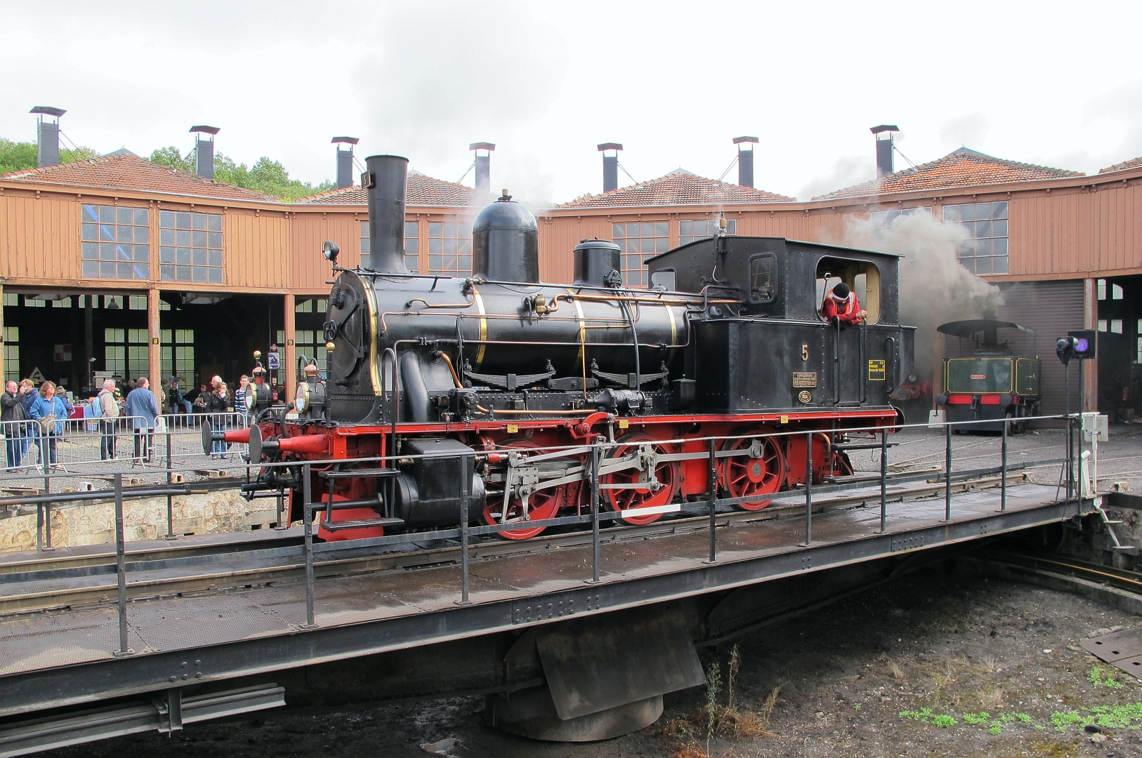 La 030 T Tigerli du chemin de fer touristique Pontarlier-Vallorbe, au dépôt de Longueville le 18 septembre 2011.